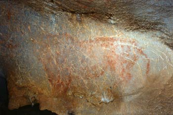 Cueva de el Haza, Cantabria, España. Arte rupestre paleolítico